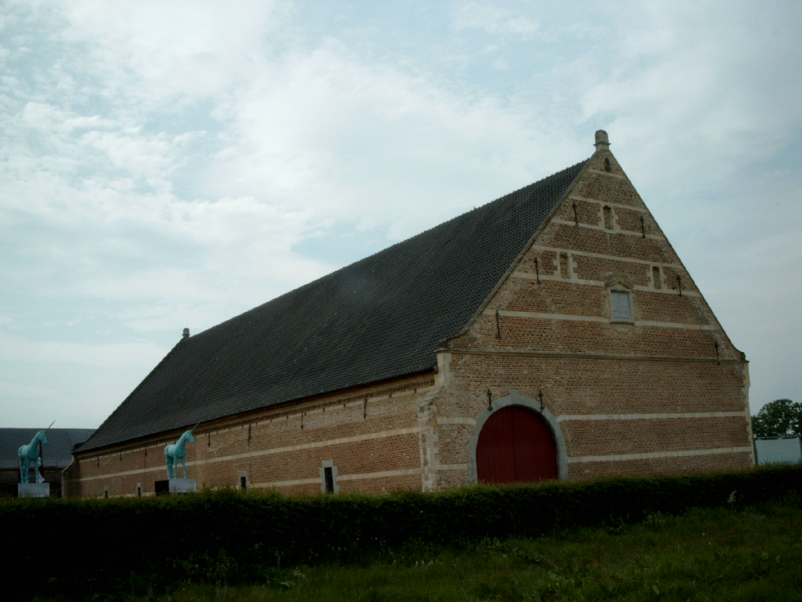 Tiendschuur aan de abdij van Herkenrode, Kuringen bij Hasselt, België